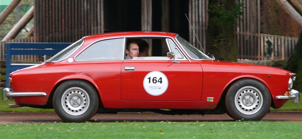 Alfa Romeo 2000 GTV Bertone